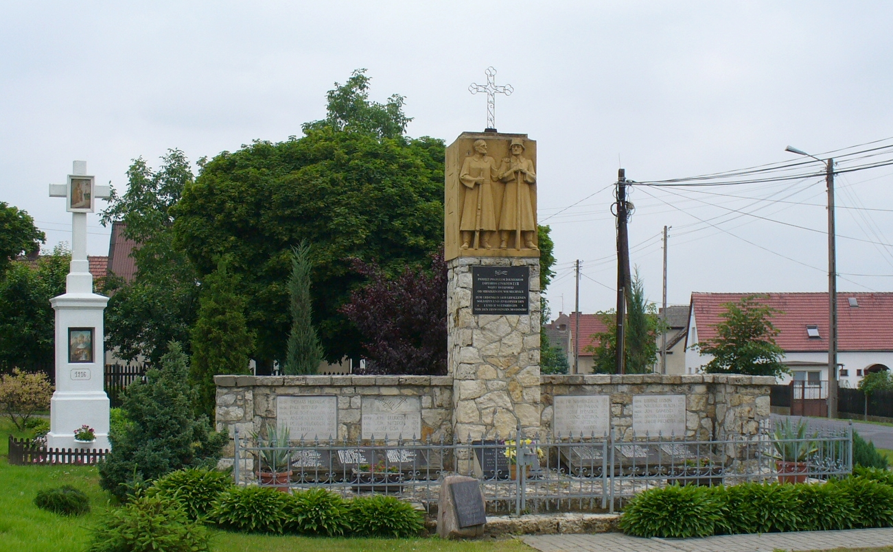 Muchenitz - Mechnice. Kriegerdenkmal - Pomnik poległych mieszkańców